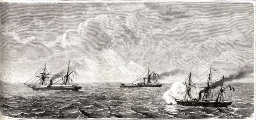 Monitor Atahualpa, Rimac, Huascar, Union